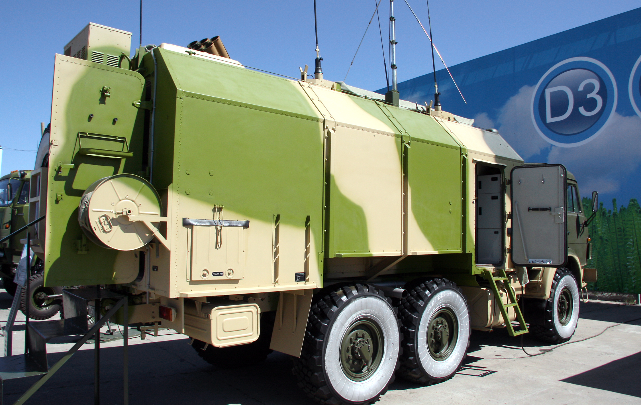 Унифицированная командно-штабная машина (УКШМ) МП32М1 является составной частью комплекса 9С729М1 "Слепок-1" и предназначена для управления боевыми действиями подразделений, оснащенных РСЗО Смерч (Unified command post vehicle MP32M1, a part of 9S729M1 Slepok-1 complex for MLRS Smerch fire control system)